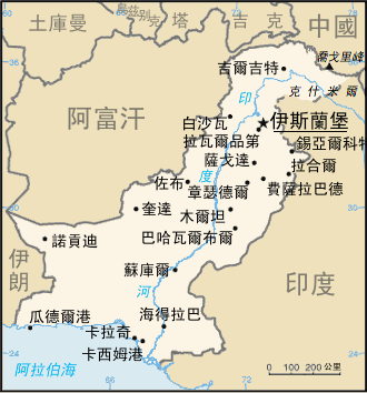 巴基斯坦地图。